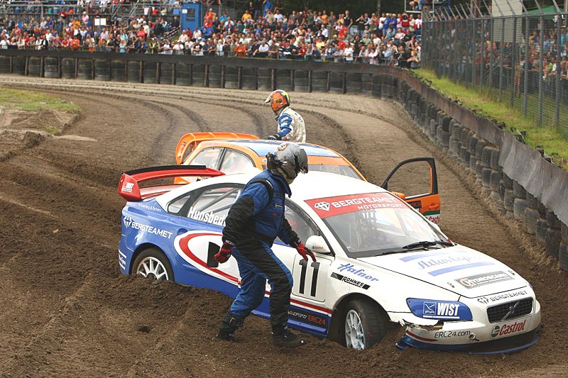 Der Norweger Ludvig Hunsbedt (Volvo S40) und der Schwede Andreas Eriksson (Ford Fiesta) landeten beim Rallycross gemeinsam im Kiesbett.